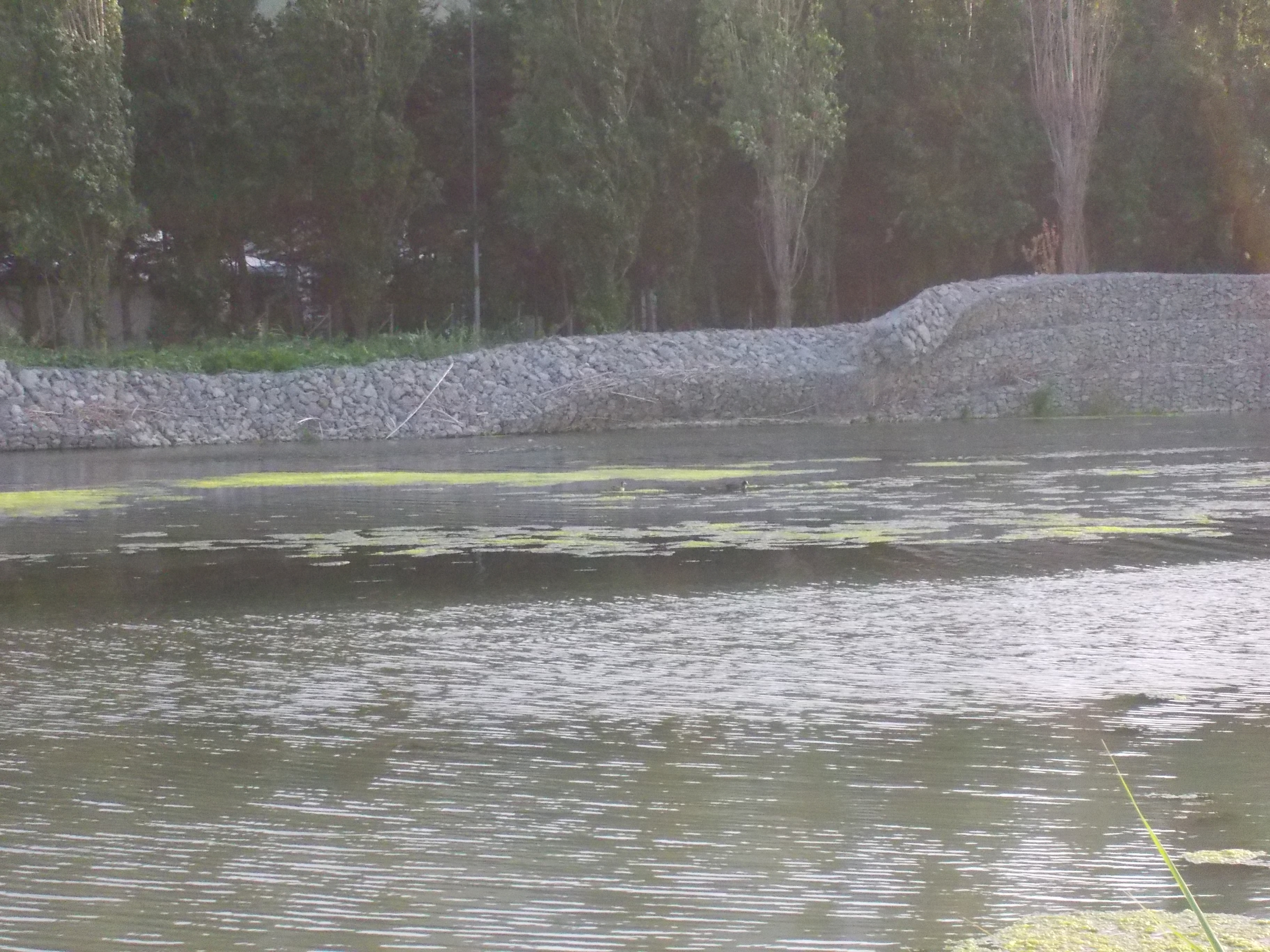 Un tratto del torrente presso la foce